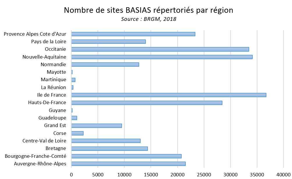 Diagramme des sites BASIAS bancarisés par région administrative